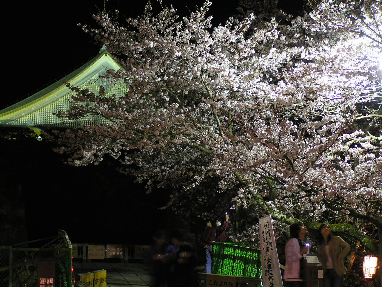 篠山城と夜桜 ～photo by akiyoshi matsuoka 松岡明芳